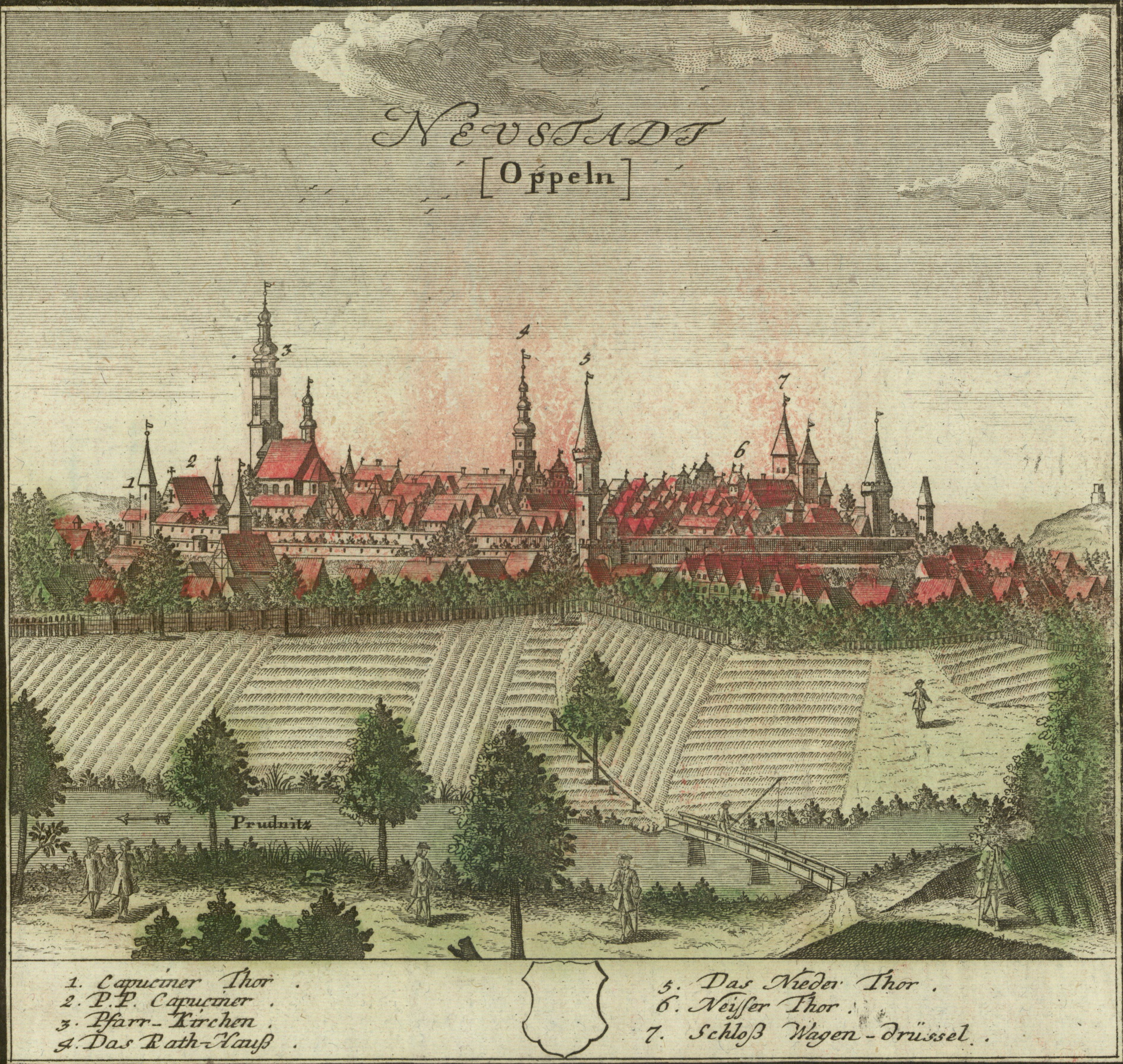 Scenographia Urbium Silesiæ. Vorstellung der Stædte Schlesien.